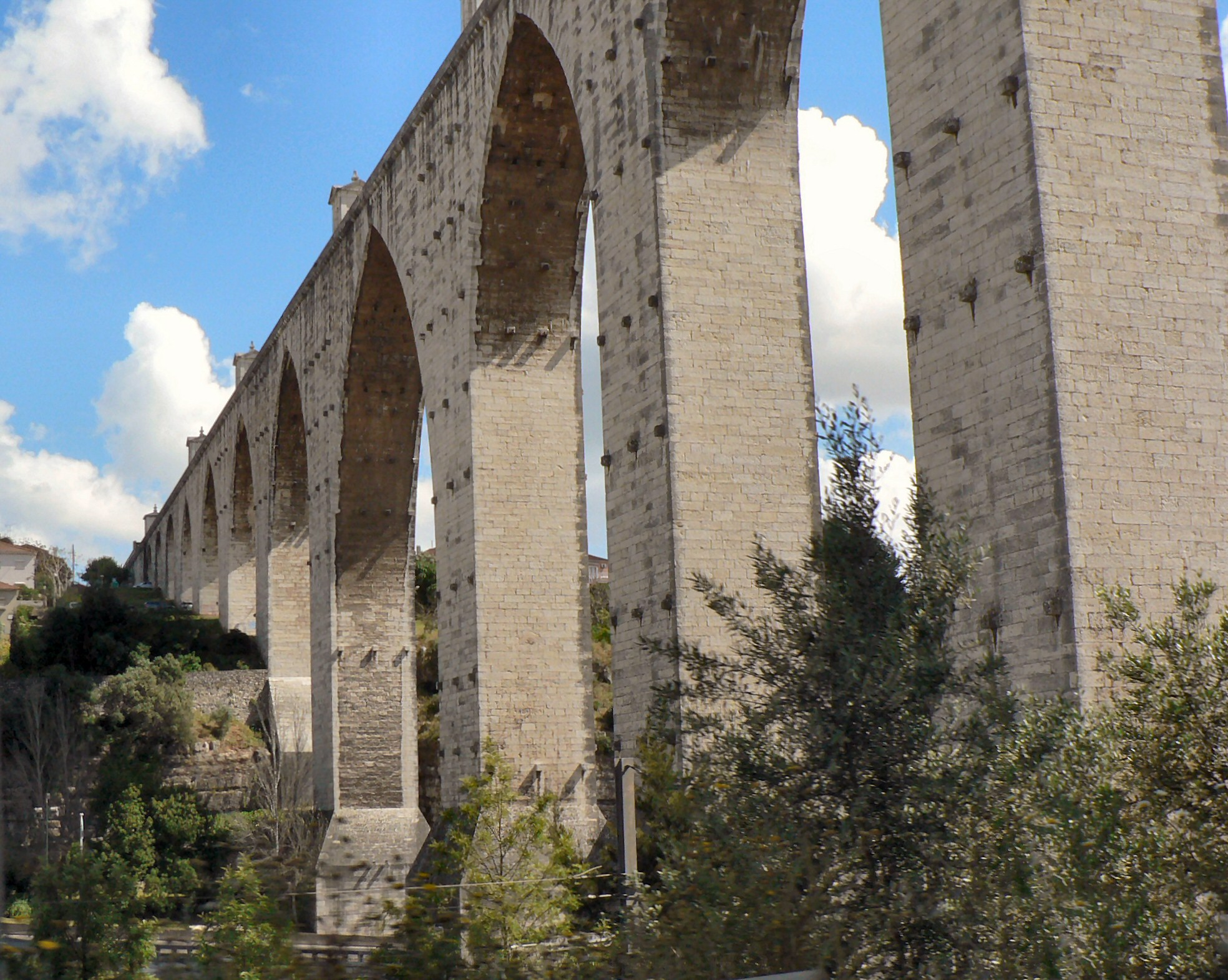 Aqueduto das Águas Livres